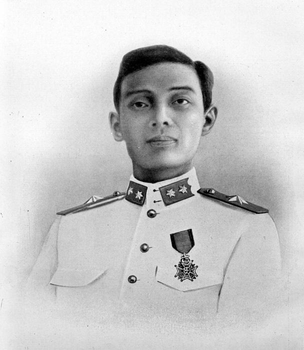 Repronegatief. Schilderij van Zijne Hoogheid Prins Pakoe Alam VIII in officieel tenue